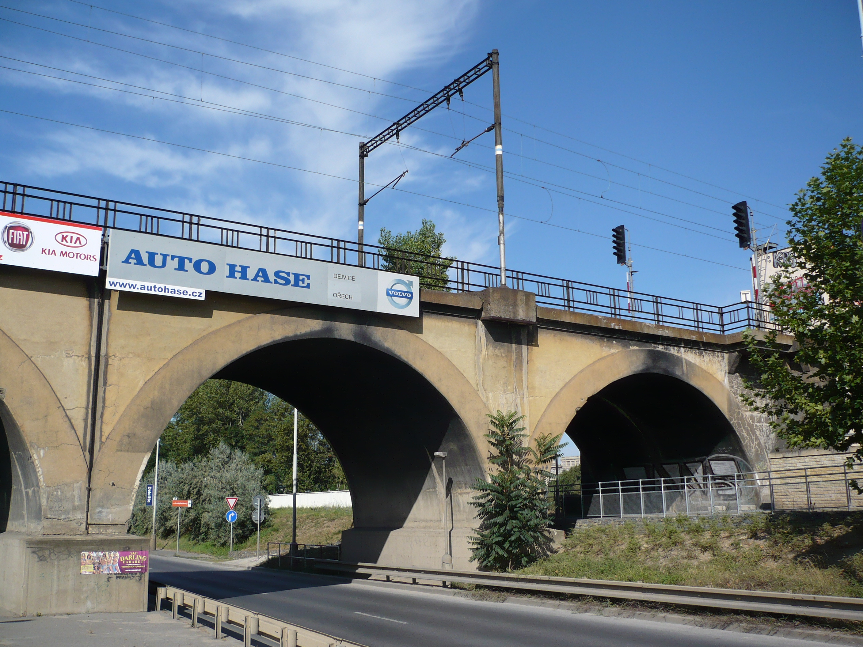 Negrelliho viadukt v místě zrušeného nádraží Praha-Těšnov, stopy po provozu parních lokomotiv jsou stále patrné.